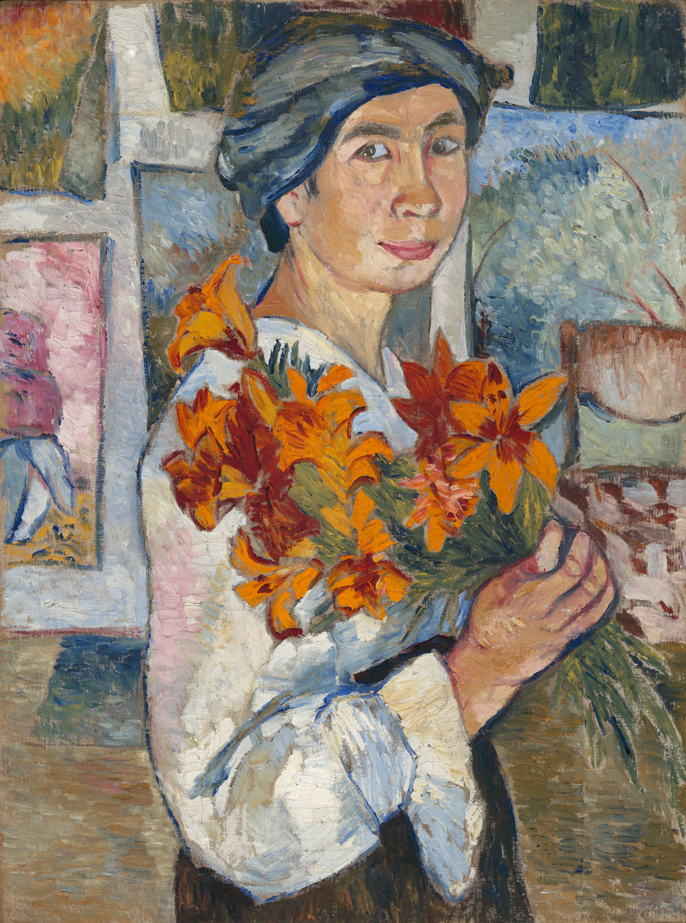 Изображен(а): Гончарова Наталья Сергеевна Автор: Гончарова Наталья Сергеевна Источник и место хранения оригинала: Государственная Третьяковская галерея, Москва Дополнительные сведения об оригинале: холст, масло, 79,5х60,5 Время создания оригинала: 1907